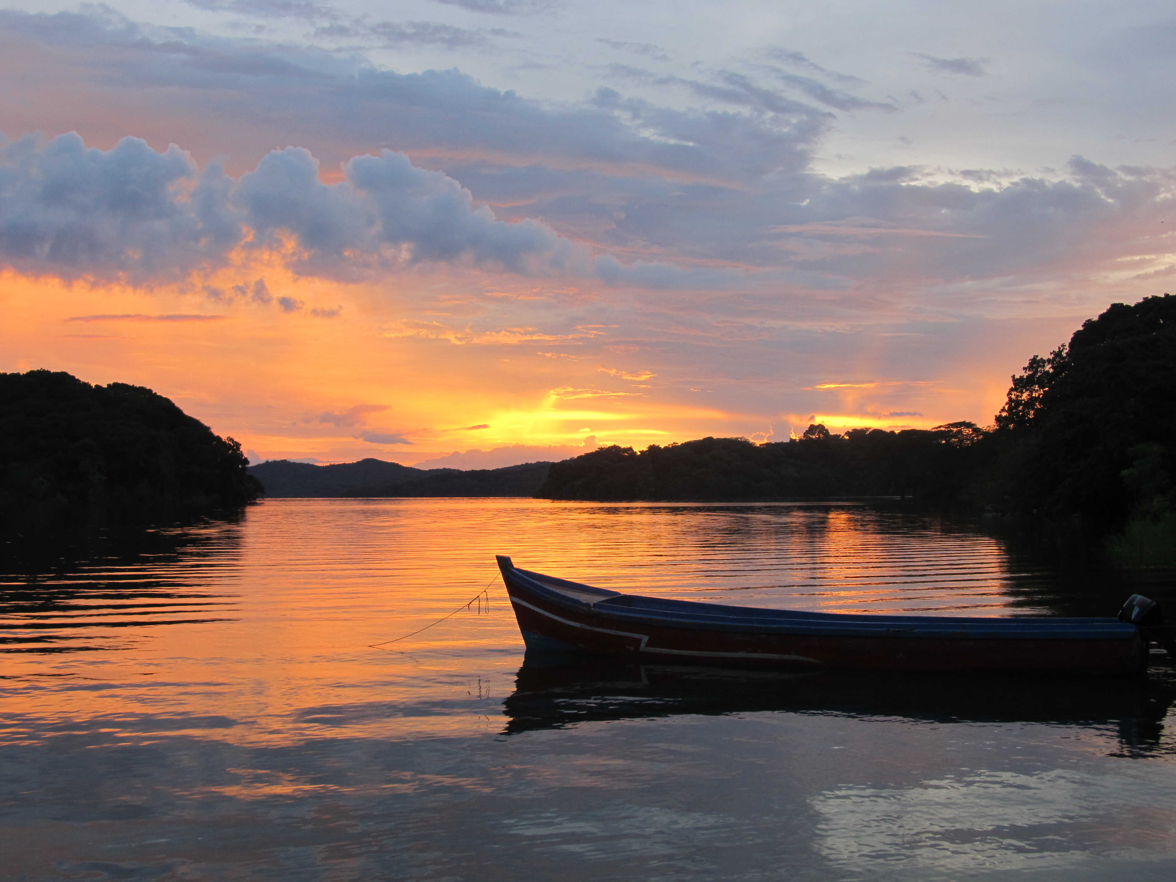 Blick auf den Nicaraguasee beim Archipel Solentiname.